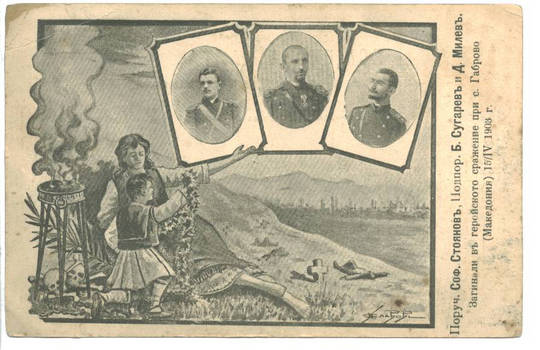 Софроний Стоянов, Борис Сугарев, Димитър Милев.